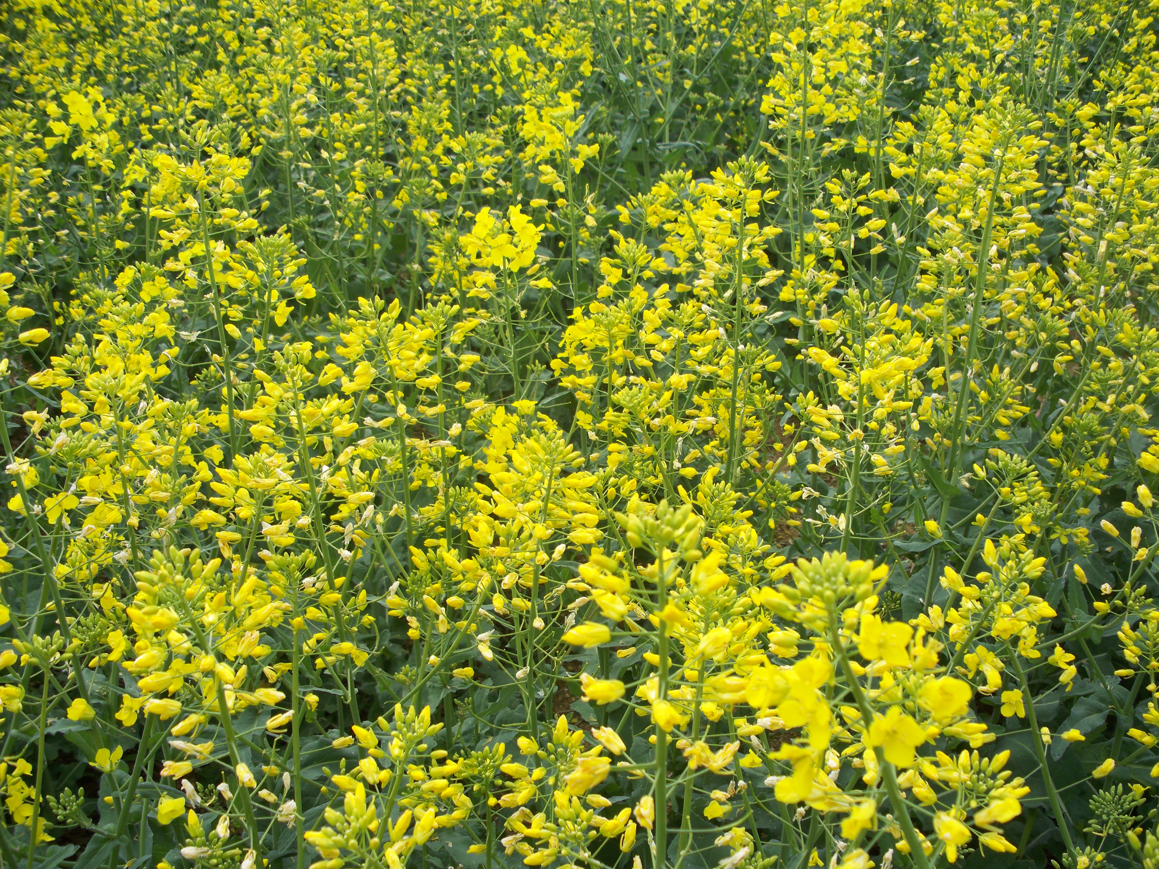 Gros plan d'un champ de colza à Prugny, dans l'Aube